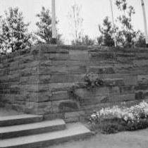 Bundesgartenschau 1957 in Köln - Stützmauer